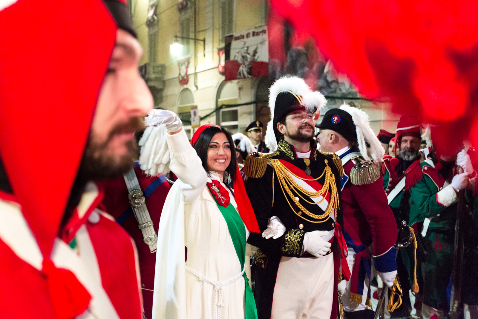 La mugnaia Domenica Venditti e il Generale Claudio Ferrero anno 2017 (foto Baldo Simone